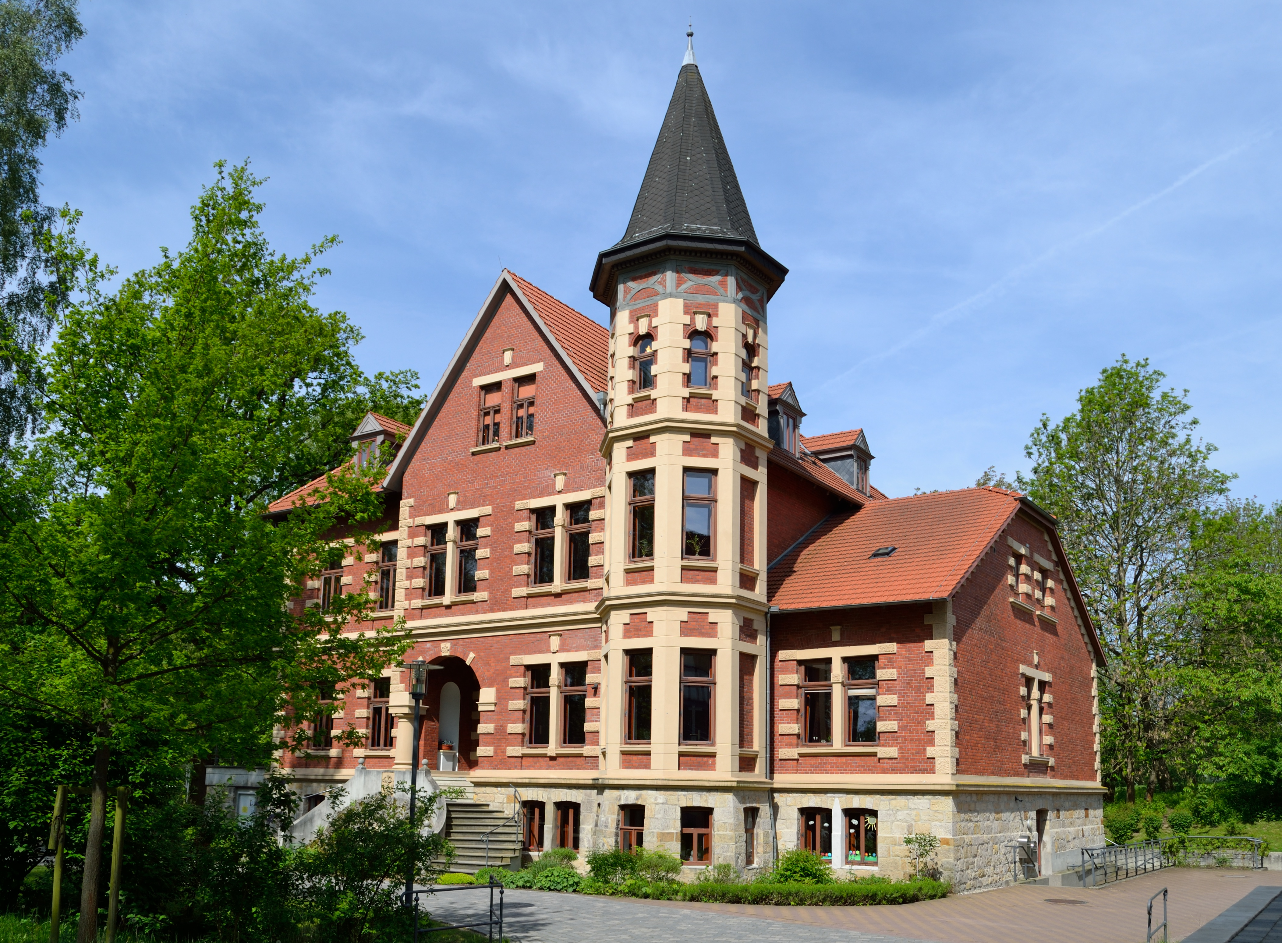 Gut Herberhausen, Objekt 3: Wohnhaus This is a photograph of an architectural monument.